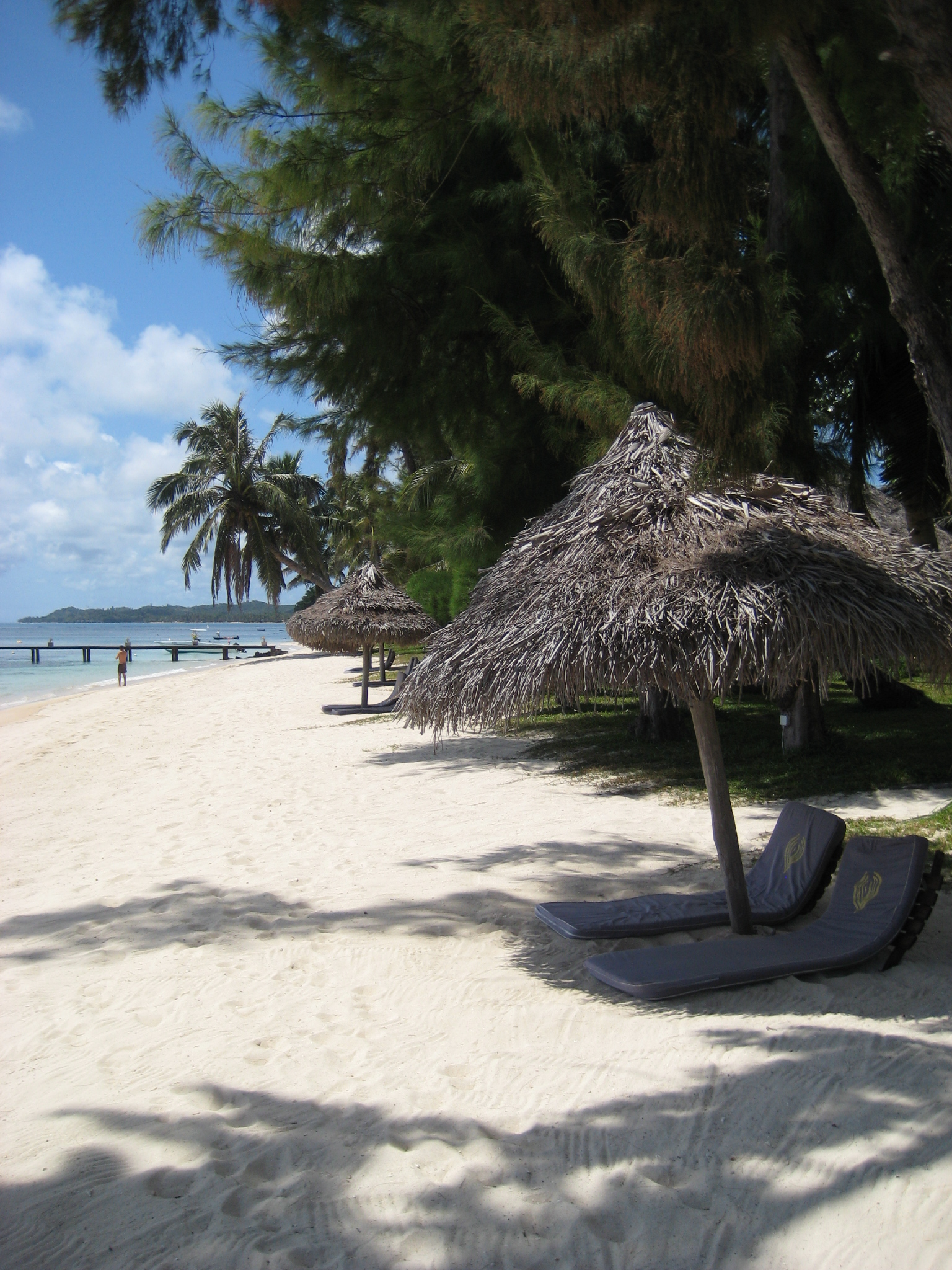 Beach, Île Sainte-Marie